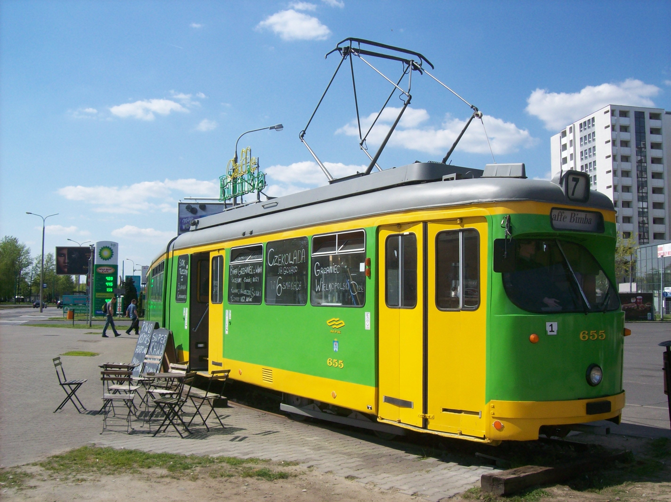 Cafe Bimba